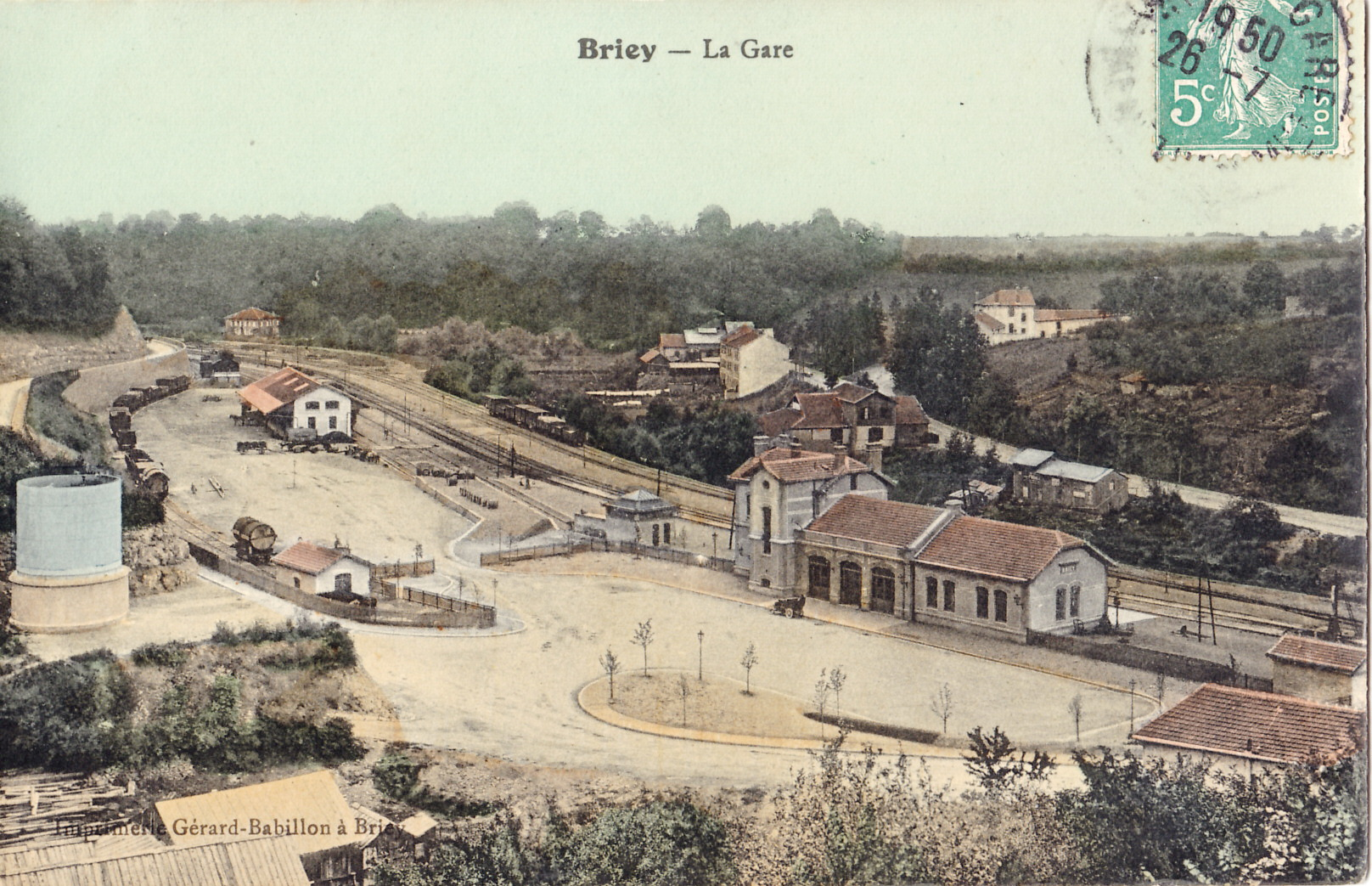 Carte postale ancienne éditée par Gérard Babillon à Briey :BRIEY - La Gare